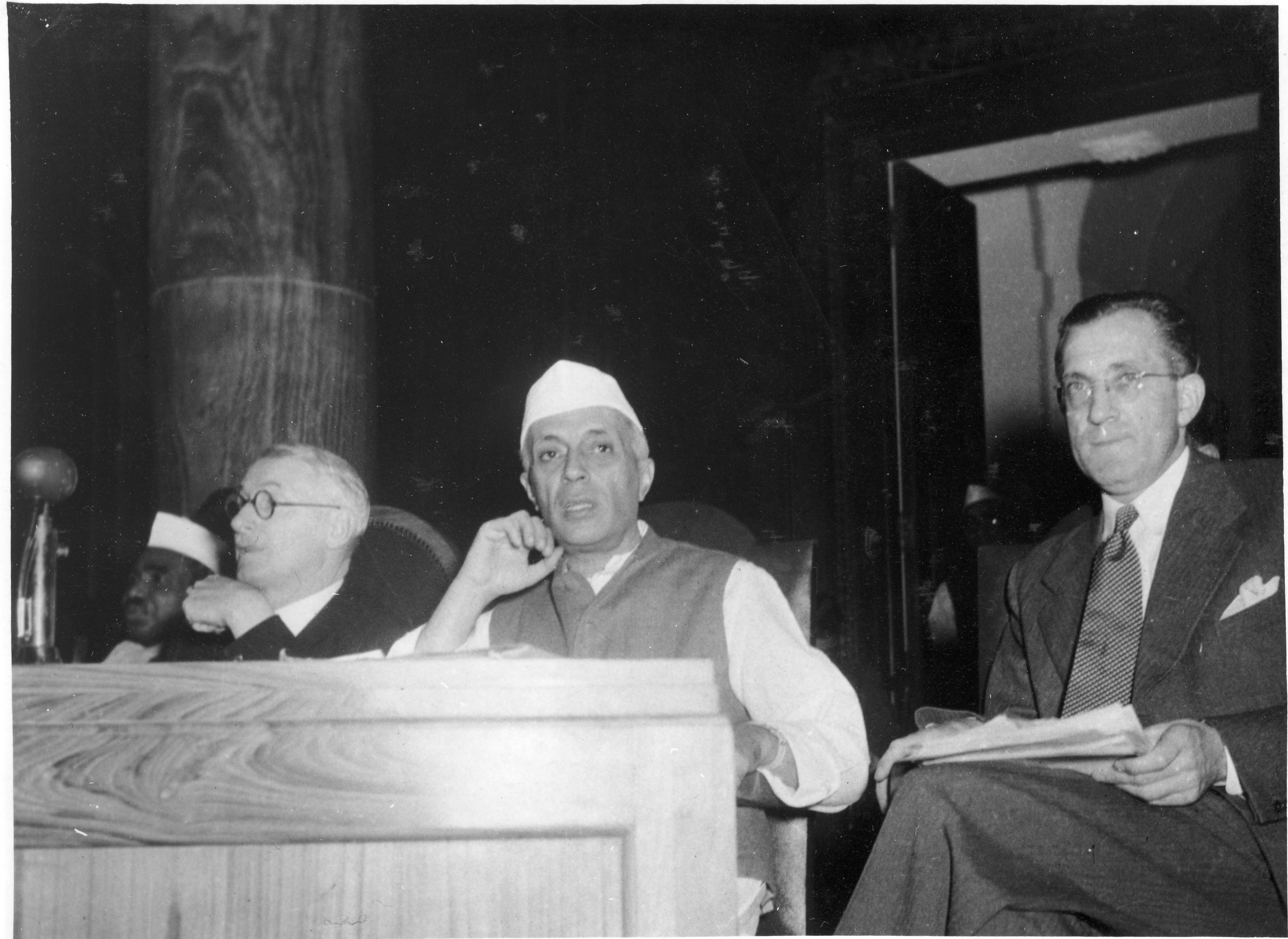 Jef Rens assiste aux cérémonies d'indépendance de l'Inde à titre de sous-directeur du Bureau International du Travail (BIT).